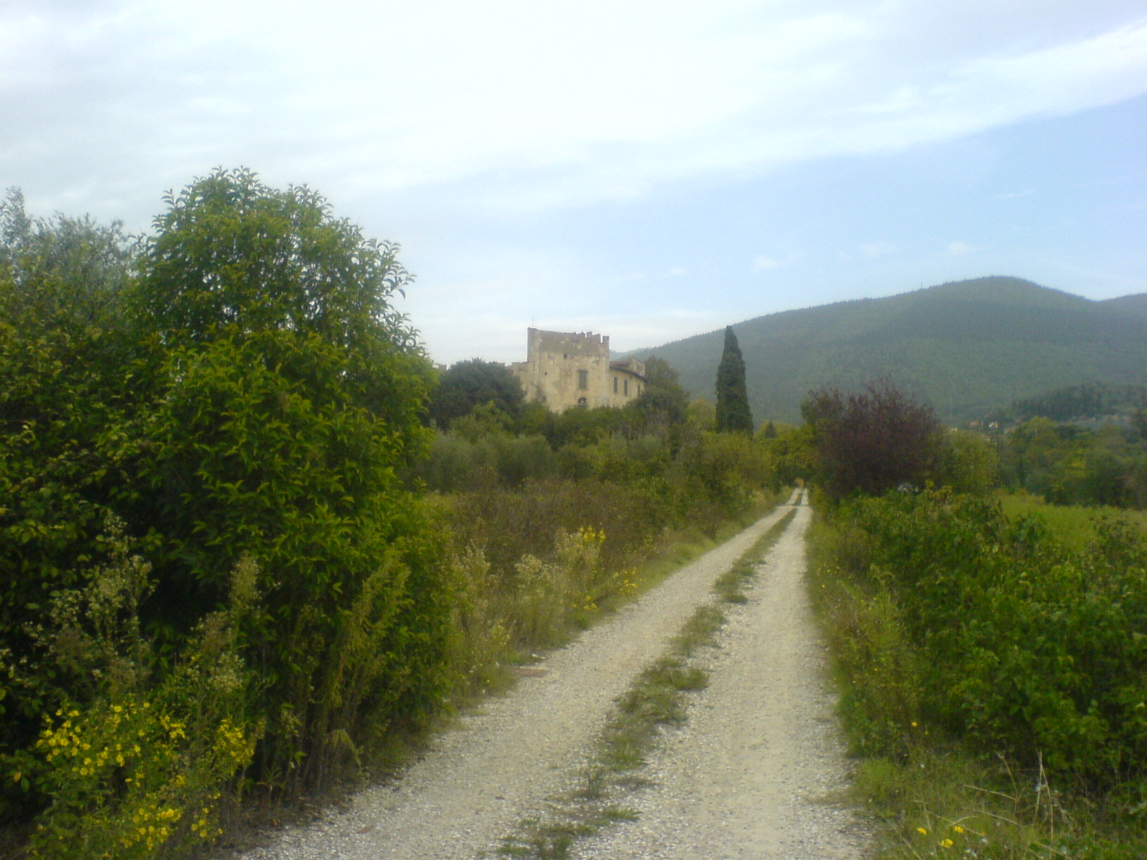 Tomba della Mula